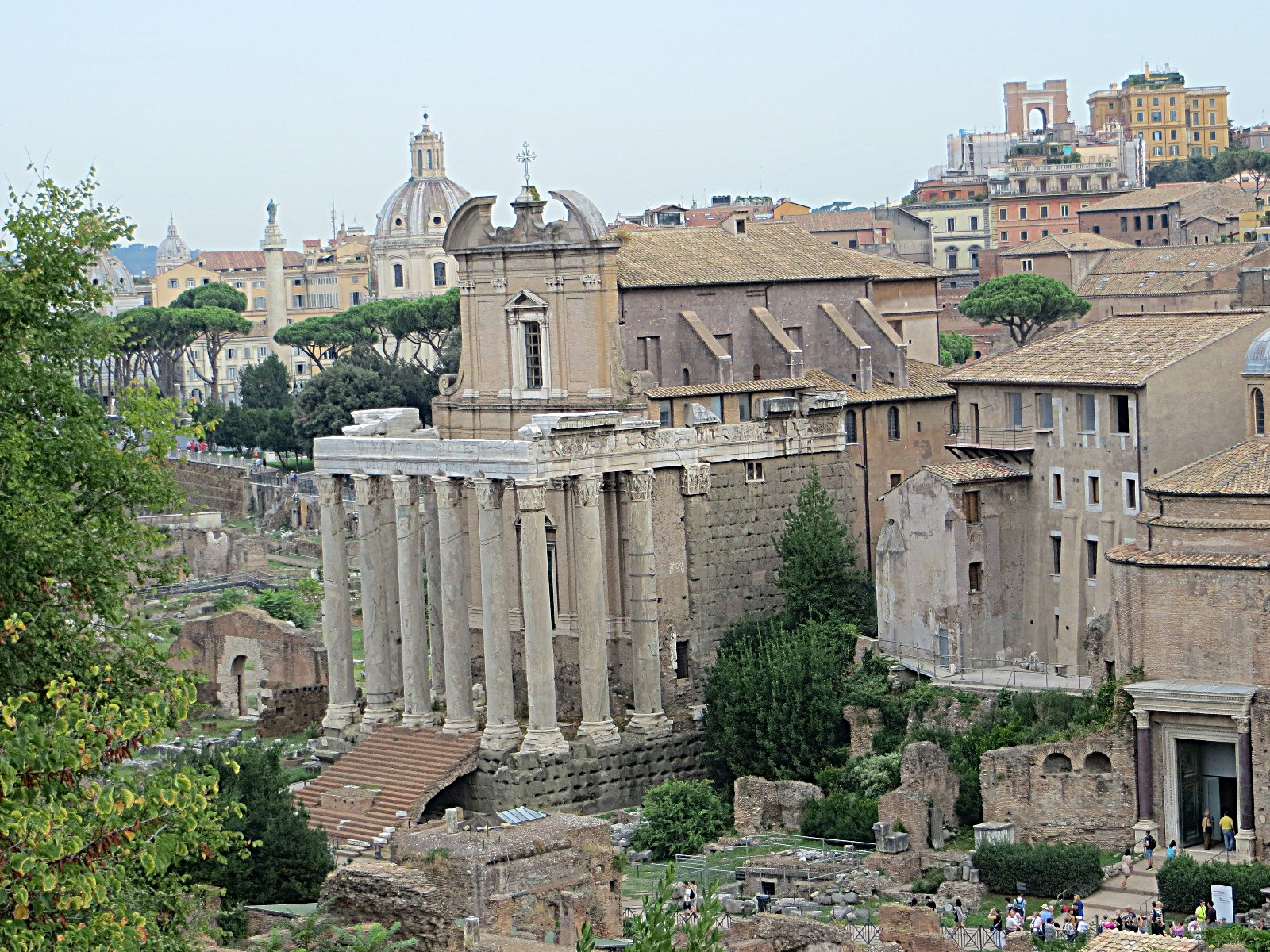 Palatino